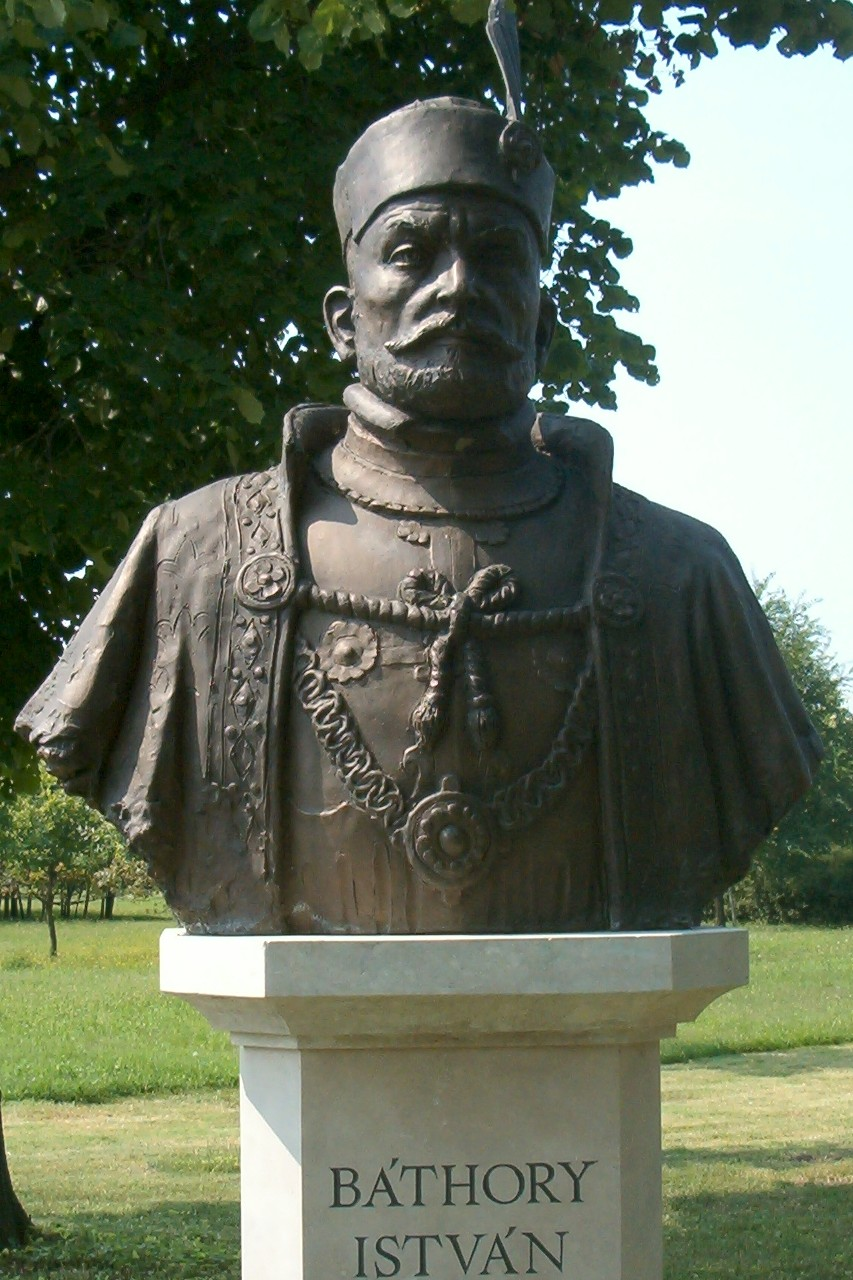 Báthory István Nemzeti Történeti Emlékpark / National Historical Memorial Park in Ópusztaszer, Hungary (Bíró Lajos alkotása) self shot photo (2005), Váradi Zsolt